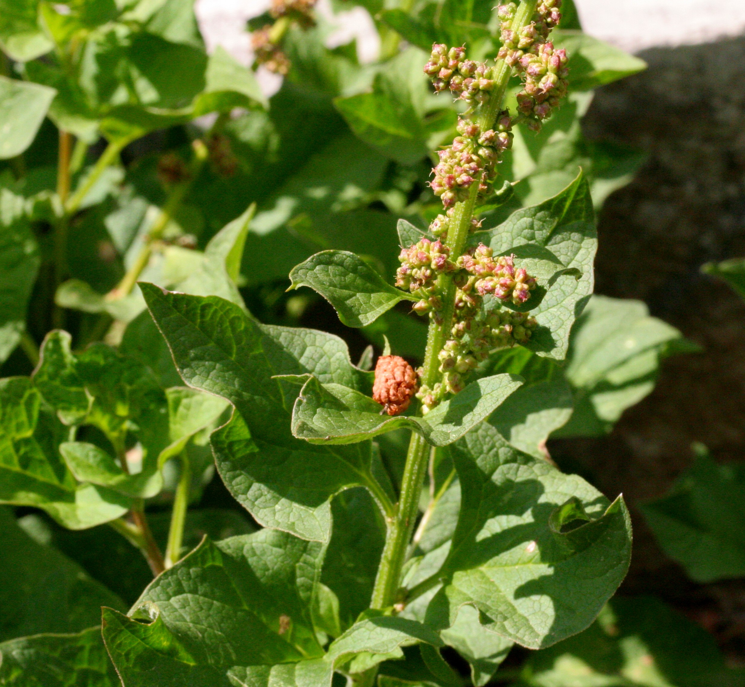 Giardino Botanico Alpino "Giangio Lorenzoni", Pian Cansiglio, Tambre d'Alpago (BL), 1000 m s.l.m.